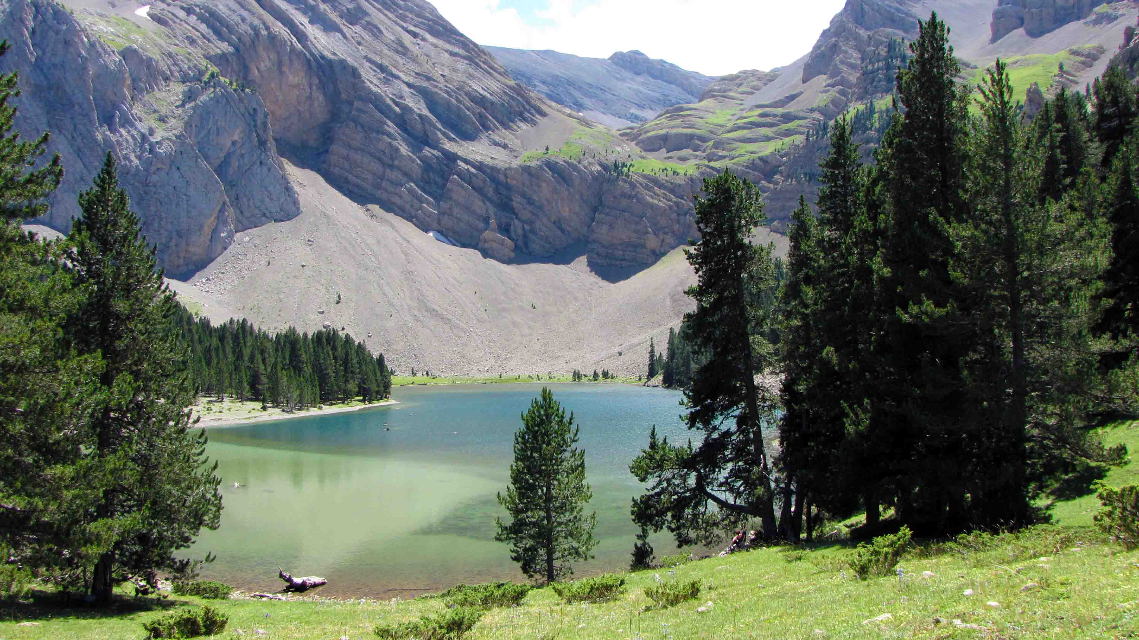 Ibon de Plan